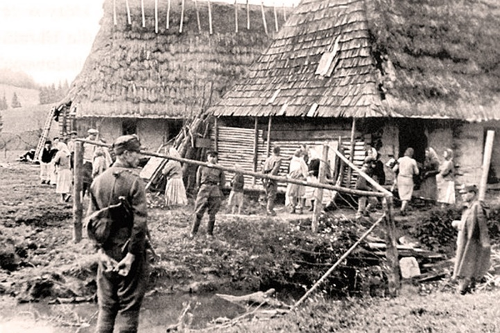 Депортація українців у рамках акції «Вісла», квітень 1947 р.